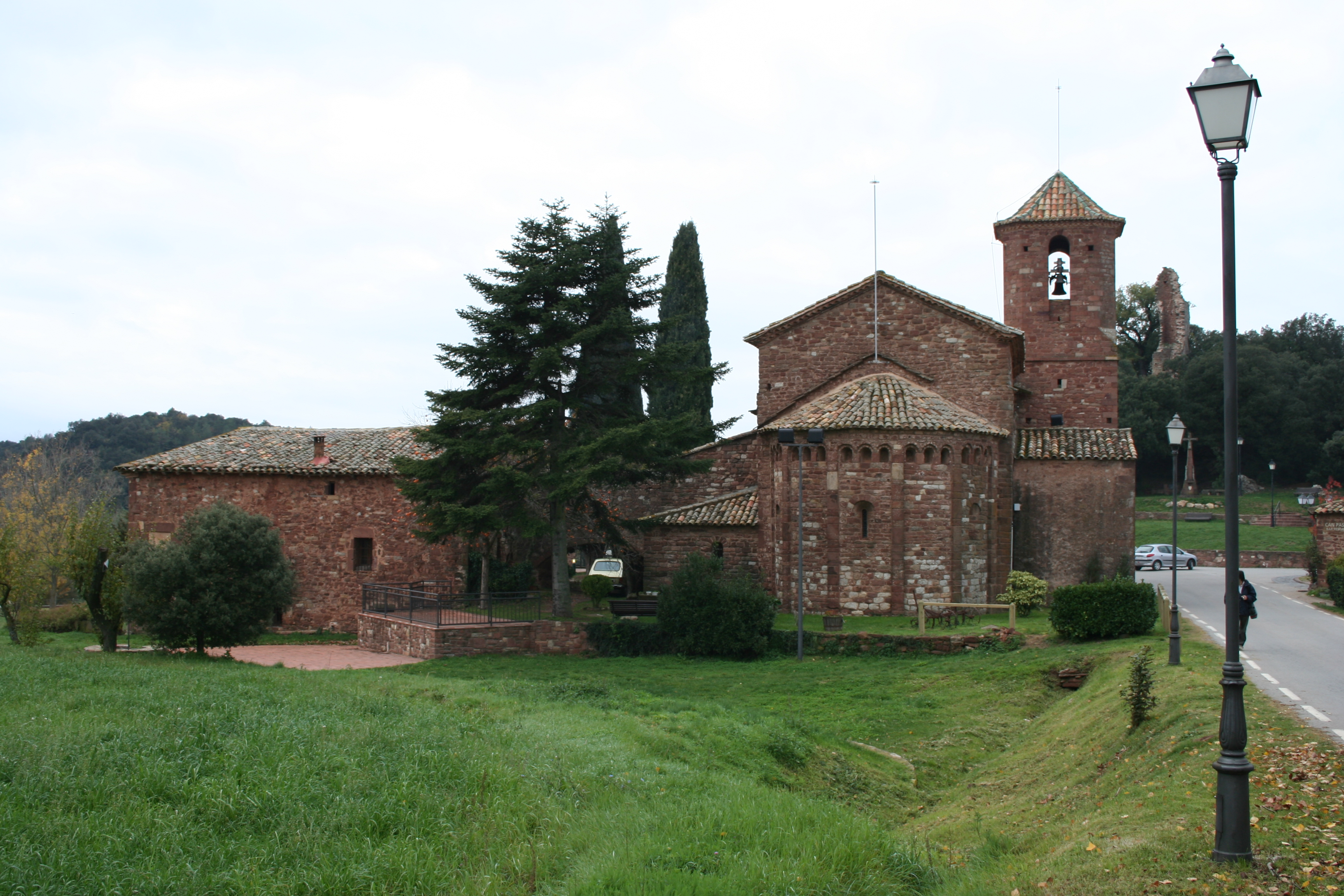 Iglesia de El Brull. Creado por Josemanuel